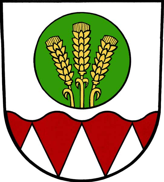 Znak obce Skaštice